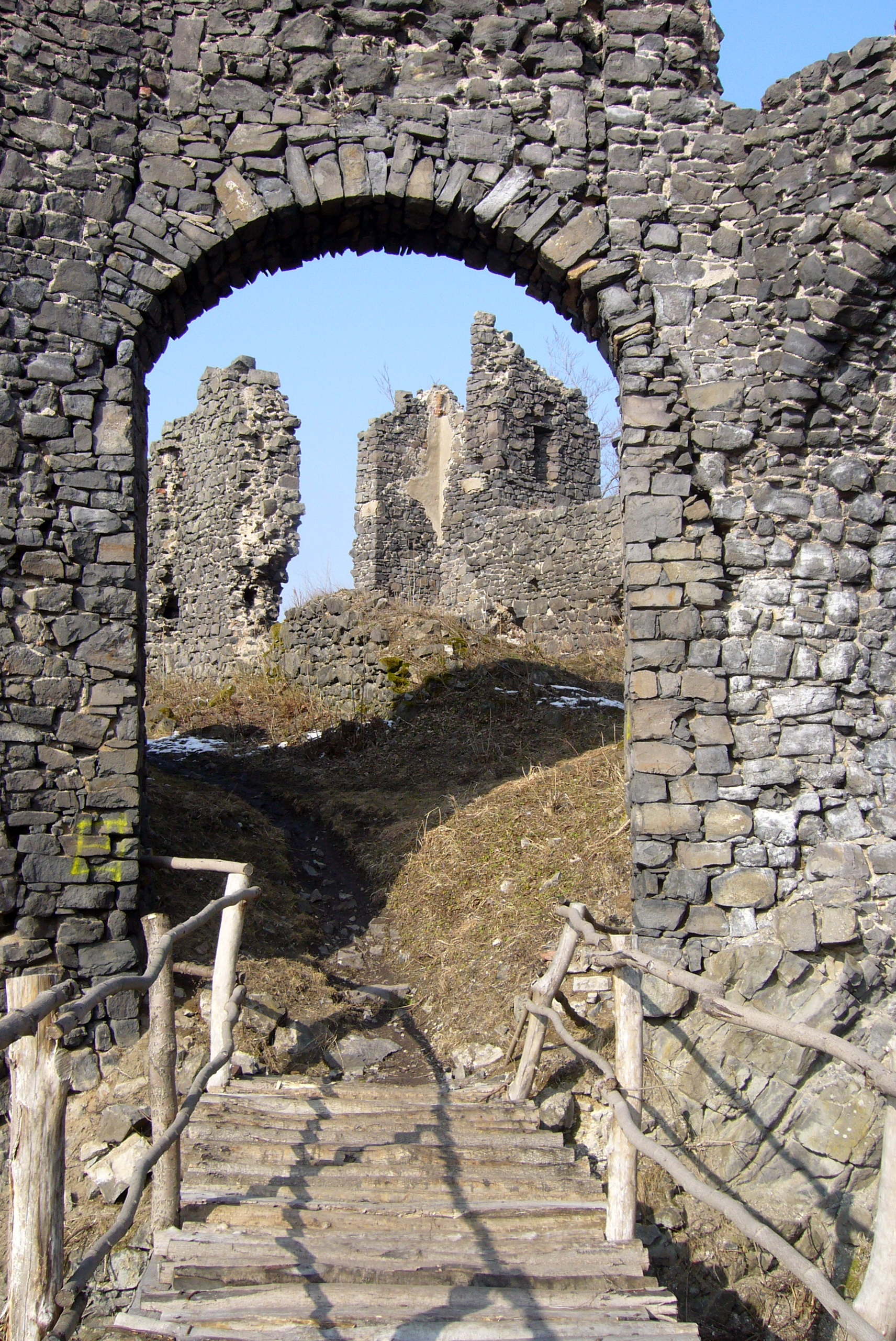 Hrad Šumburk - detail hlavní brány